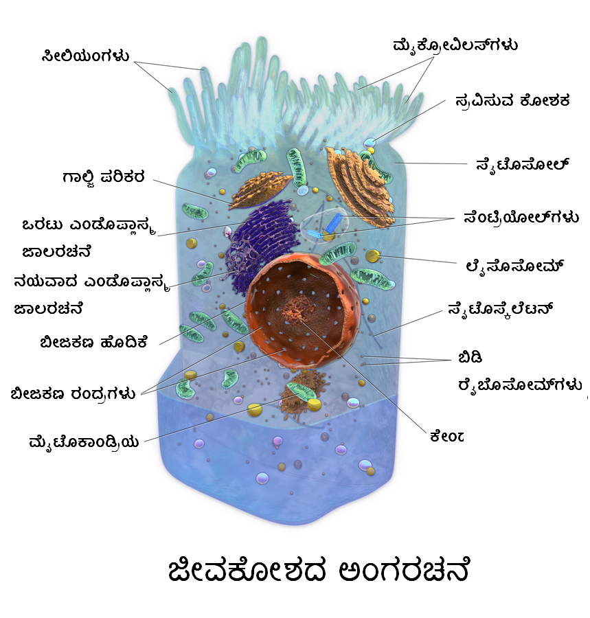 ಕನ್ನಡ: ಜೀವಕೋಶದ ಅಂಗರಚನೆ